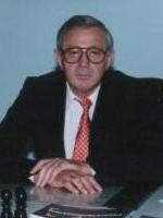 Витомир Васић, Свилајнац, Србија